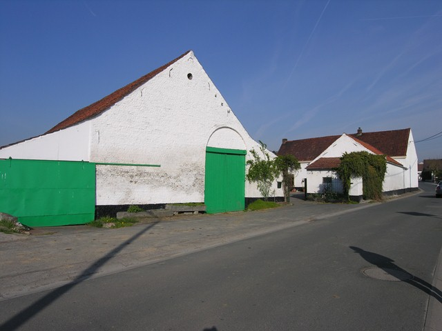 Dilbeek Elegemstraat 125